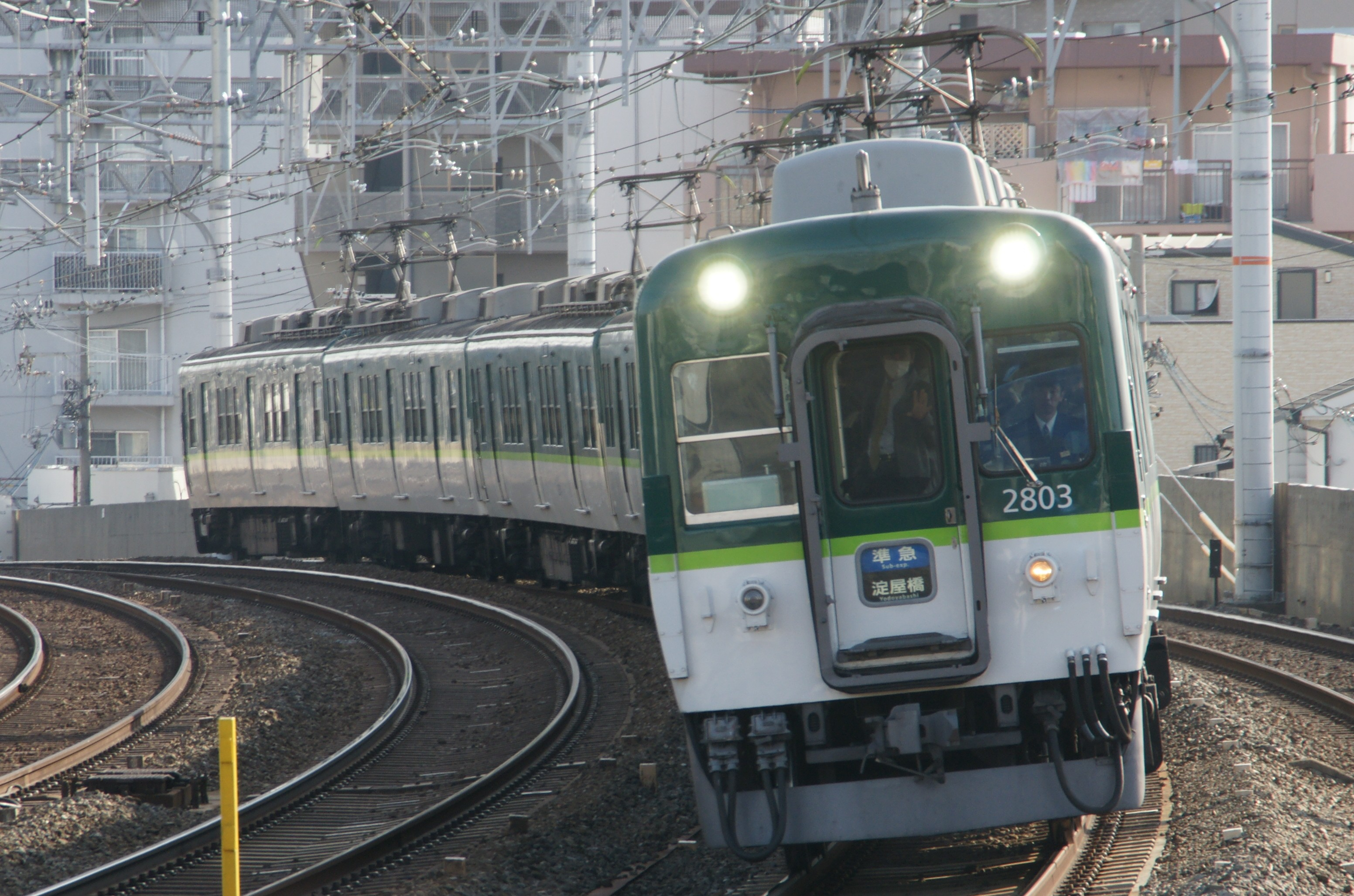 西三荘駅にて撮影